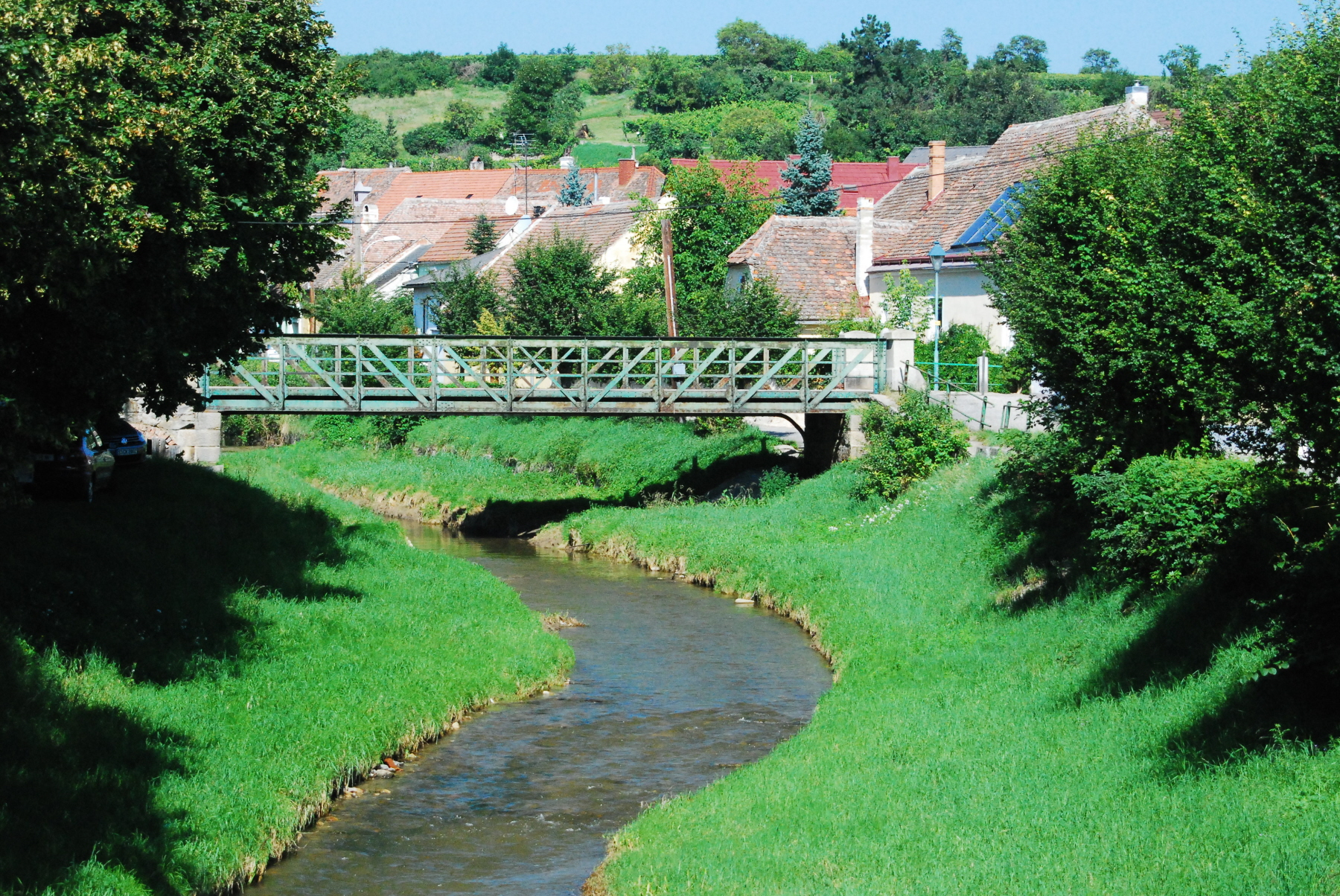 Der Fluss Pulkau in der Stadt Pulkau in Niederösterreich